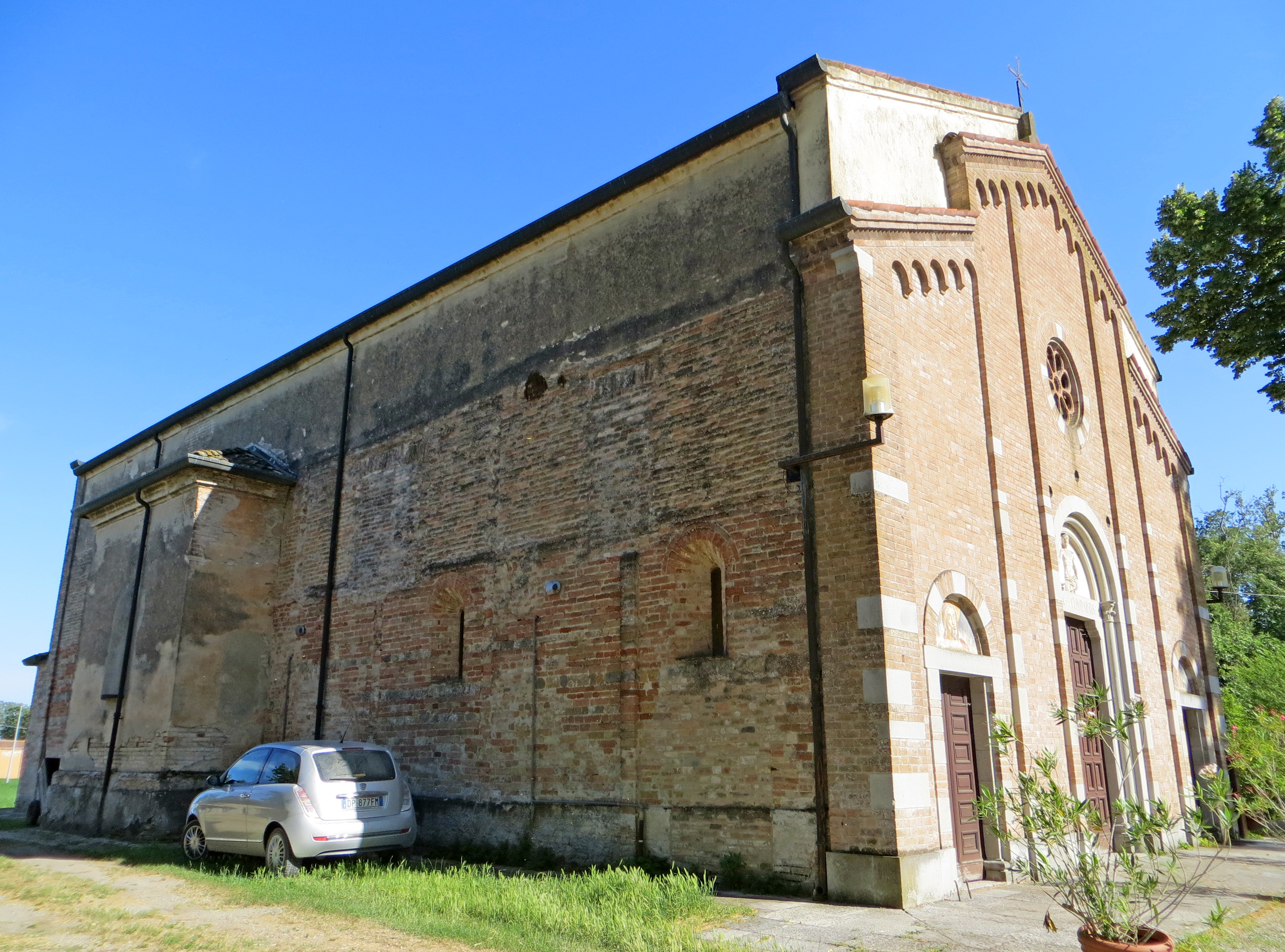 Pieve di San Giovanni Battista (Gainago, Torrile) - facciata e lato nord